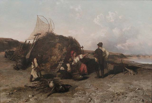 Böhm Pál: Tóparton (olaj, fa)